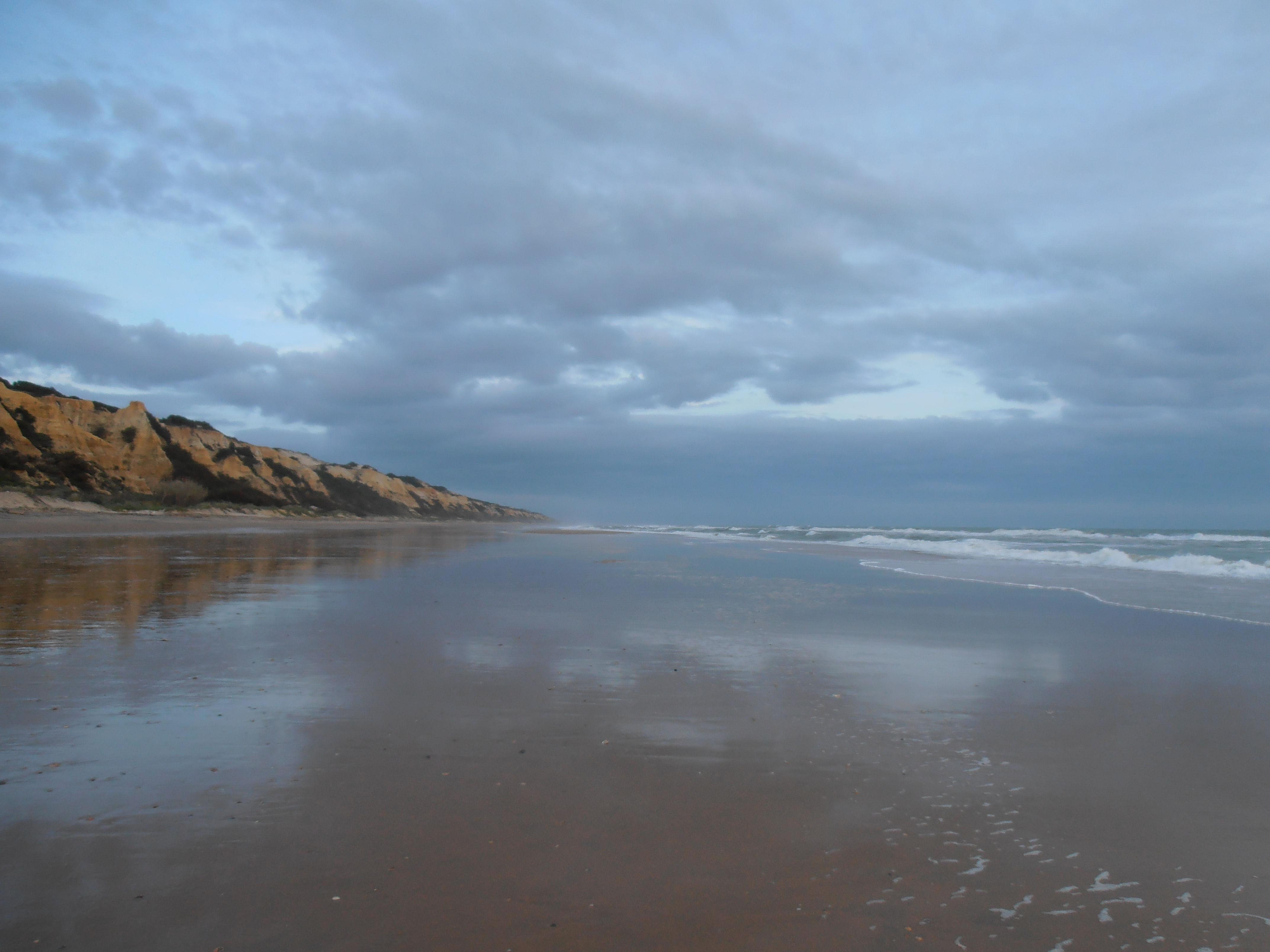 Playa del Parador de Mazagón